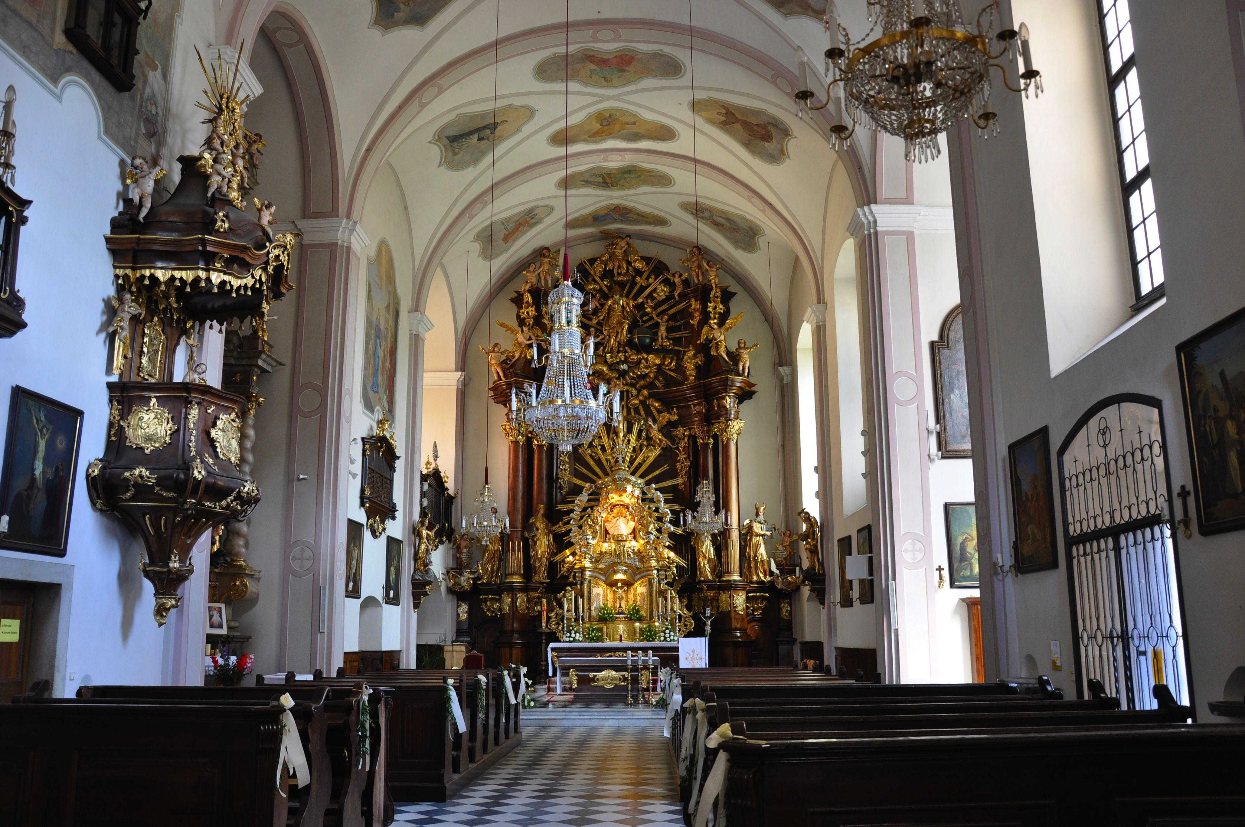 Kath. Pfarrkirche, Wallfahrtskirche Mariä Himmelfahrt, Innenraum